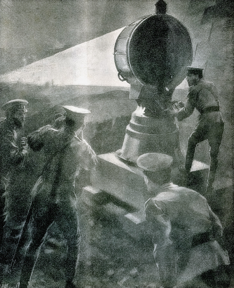 Un des projecteurs électriques surprenant les Japonais qiu se préparent à une attaque nocturne